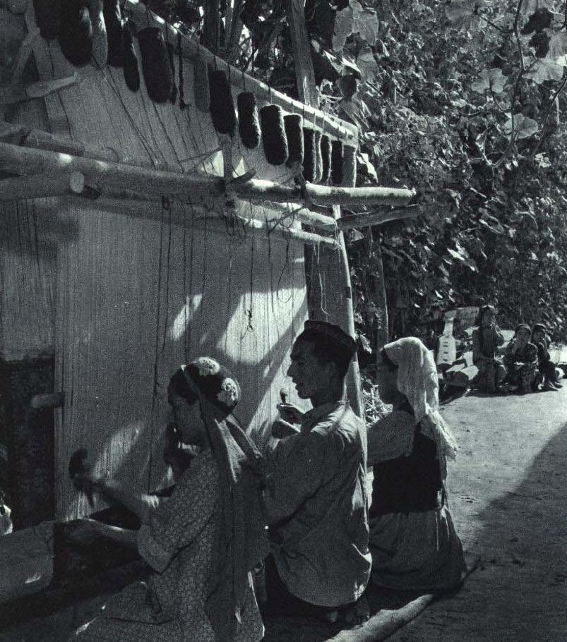 1964-08 1964年 新疆织毯